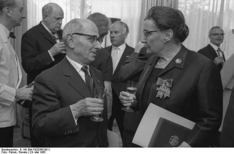 Empfang und Ordensverleihung an Bundestagsabg. durch Bundestagspräsident Dr. Gerstenmaier Bonn (Hellenbrock, Frau Engländer)